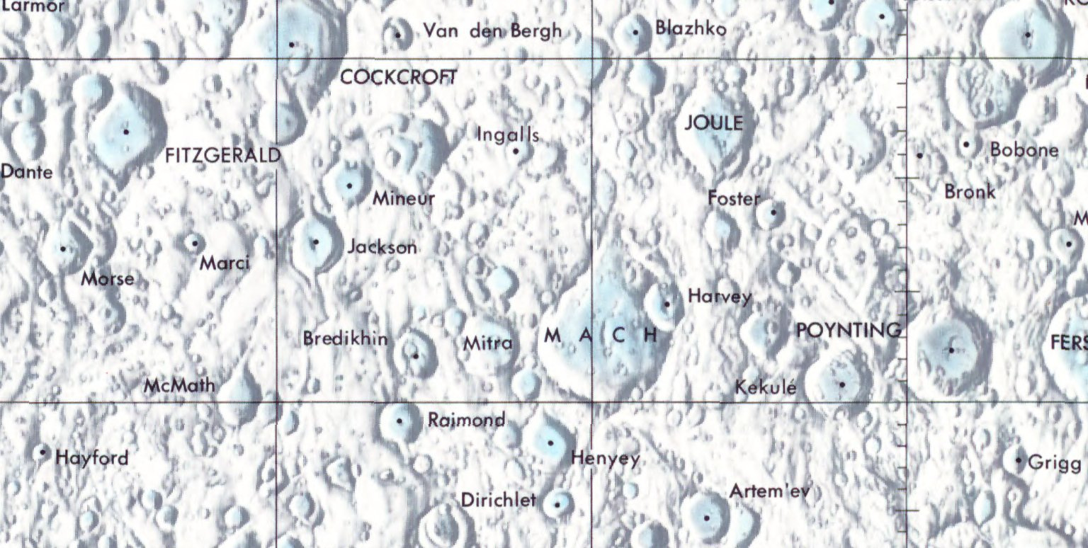 Cráter lunar Mitra. Localización. (Moon Map - Equatorial region 45S to 45N - LPC1 - NASA)